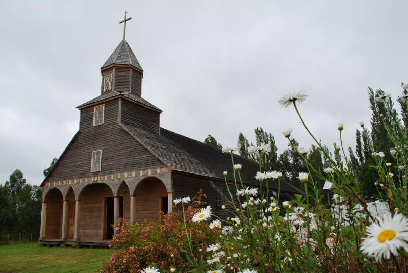 Iglesia de Ichuac